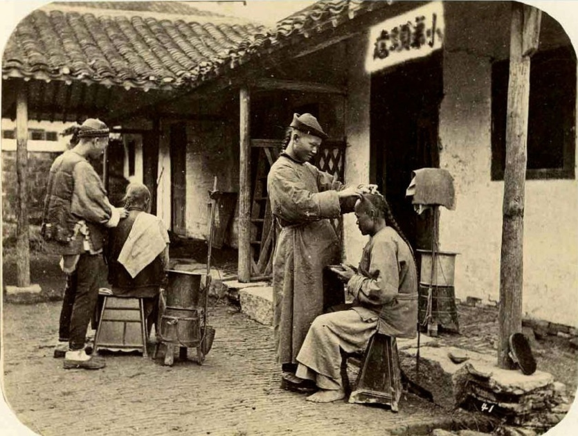 中文（香港）: “正月裡，不剃頭；正月裡剃頭死舅舅。”這首民謠，傳唱了三百六十多年，歲月早已朦朧了原來的意思，倒給九州大地上的剃頭師傅們，每年一個月的“年休假”。時至今日，大多數人依然恪守著正月不進理髮館的習俗。其實，這首民謠根本不是對人們正月剃頭就一定會死舅舅的預言，而是在用“正月不剃頭——思舊”這一無奈，去咒罵滿清政府用鋼刀硬弩強行推廣的“剃髮令”。 （剃頭店蛋白照片1870年代 ）